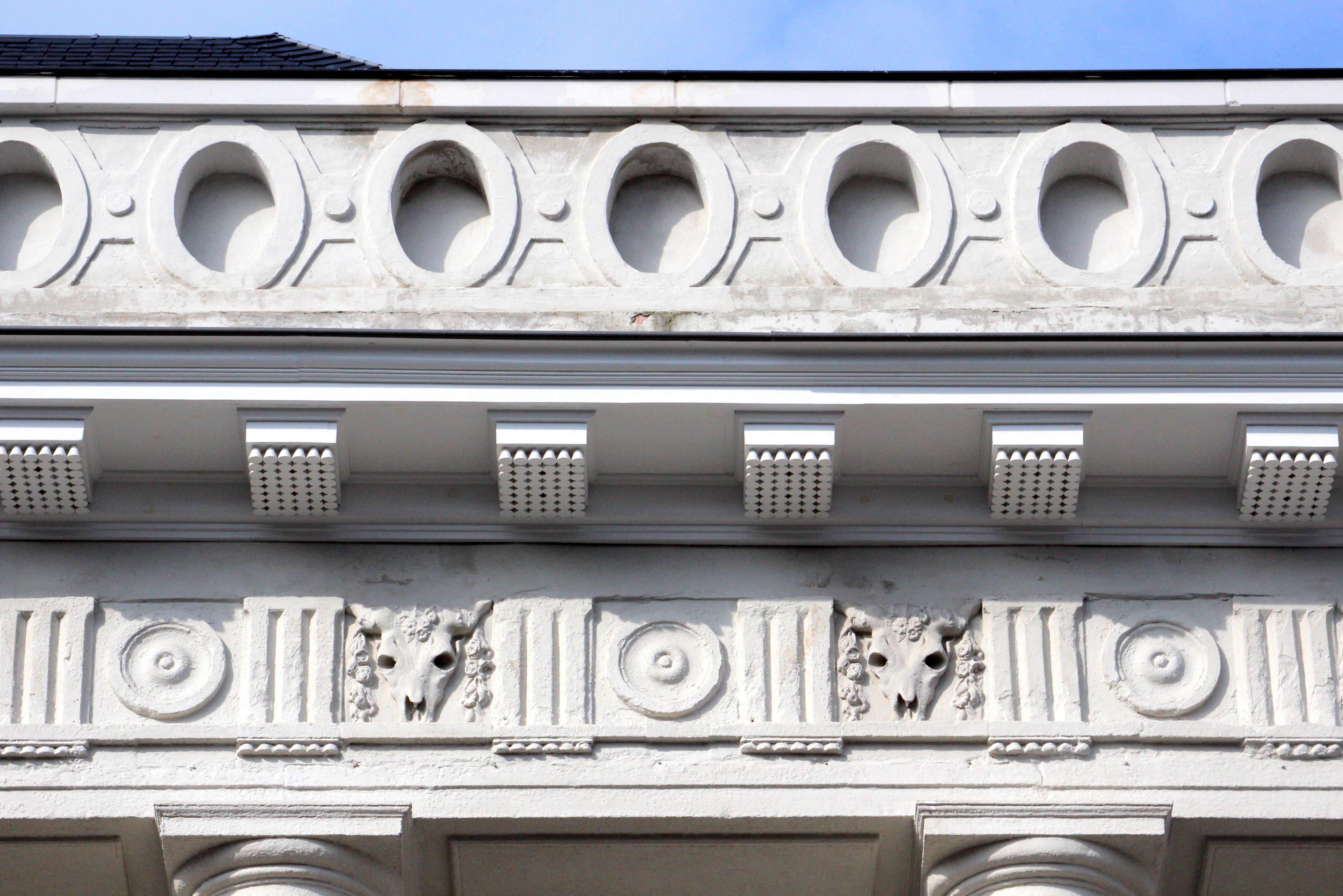 Place des Martyrs, Bruxelles, Belgique. Immeuble d'angle vers la rue Saint-Michel. Frise à triglyphes et métopes surmontée d'un attique ajouré